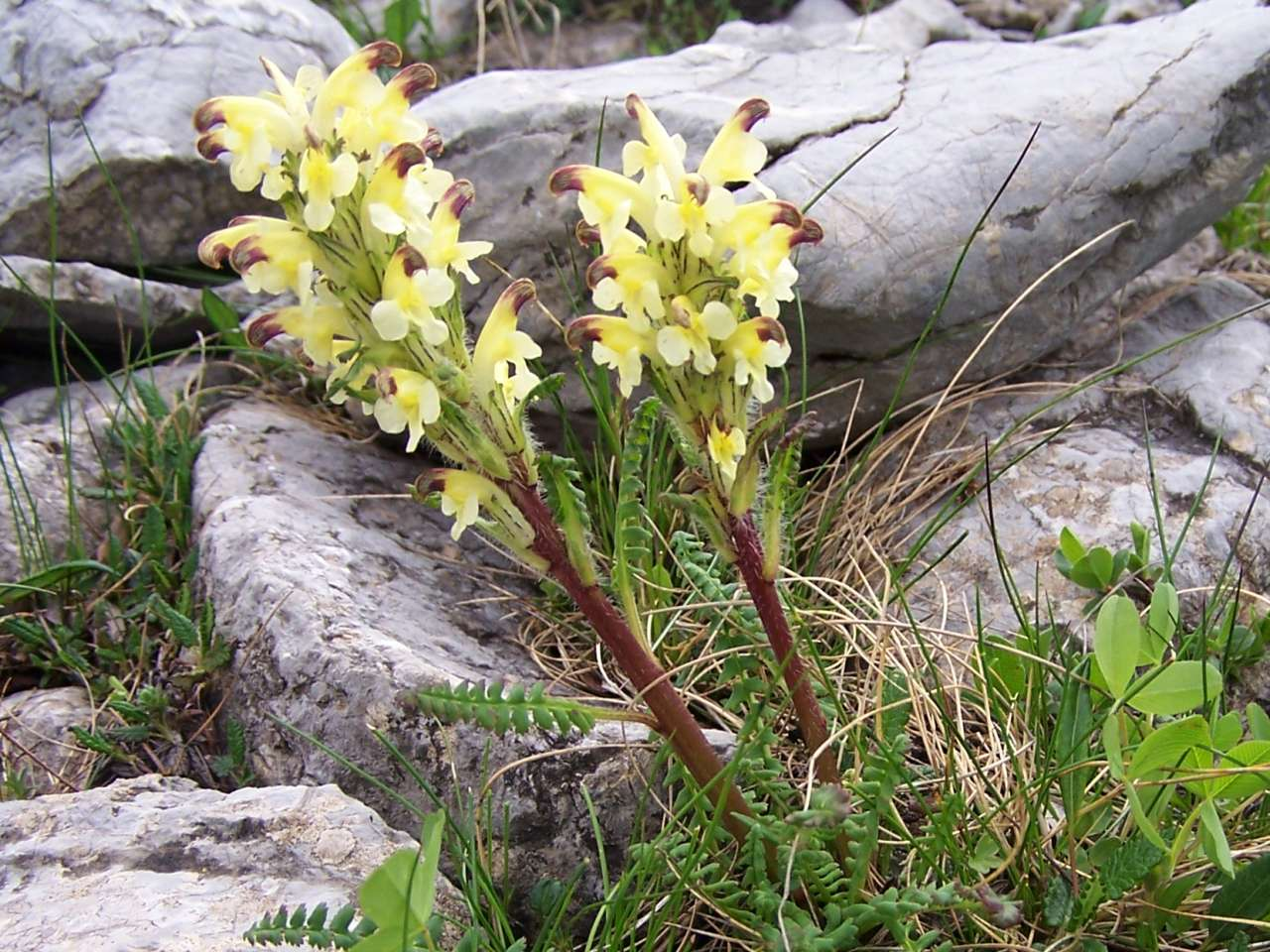 Pedicularis oederi (pl. gnidosz dwubarwny), habitat: Tatra Mountains, Hala Upłaz